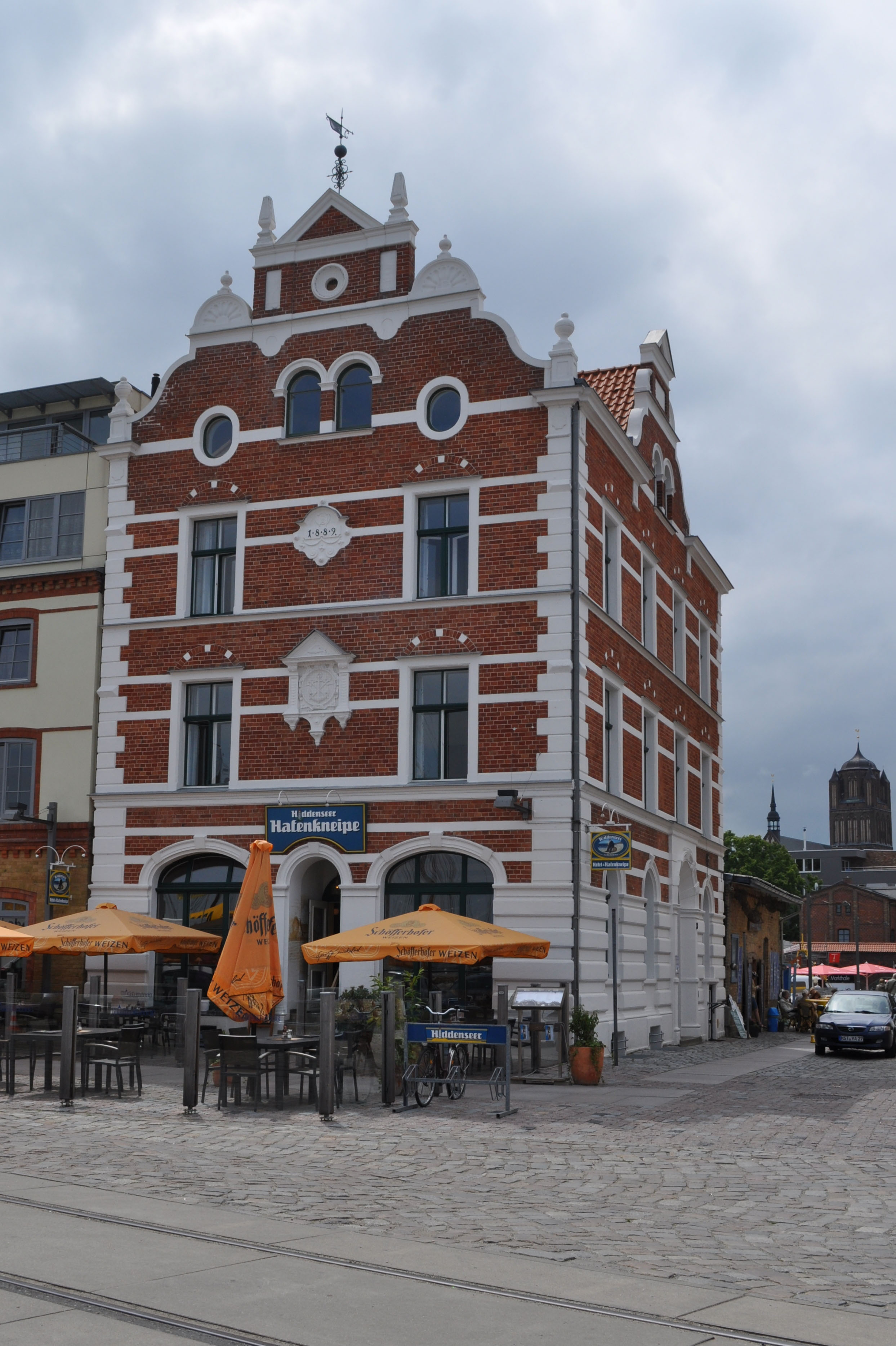 Im Tierpark Stralsund (see Tierpark Stralsund.